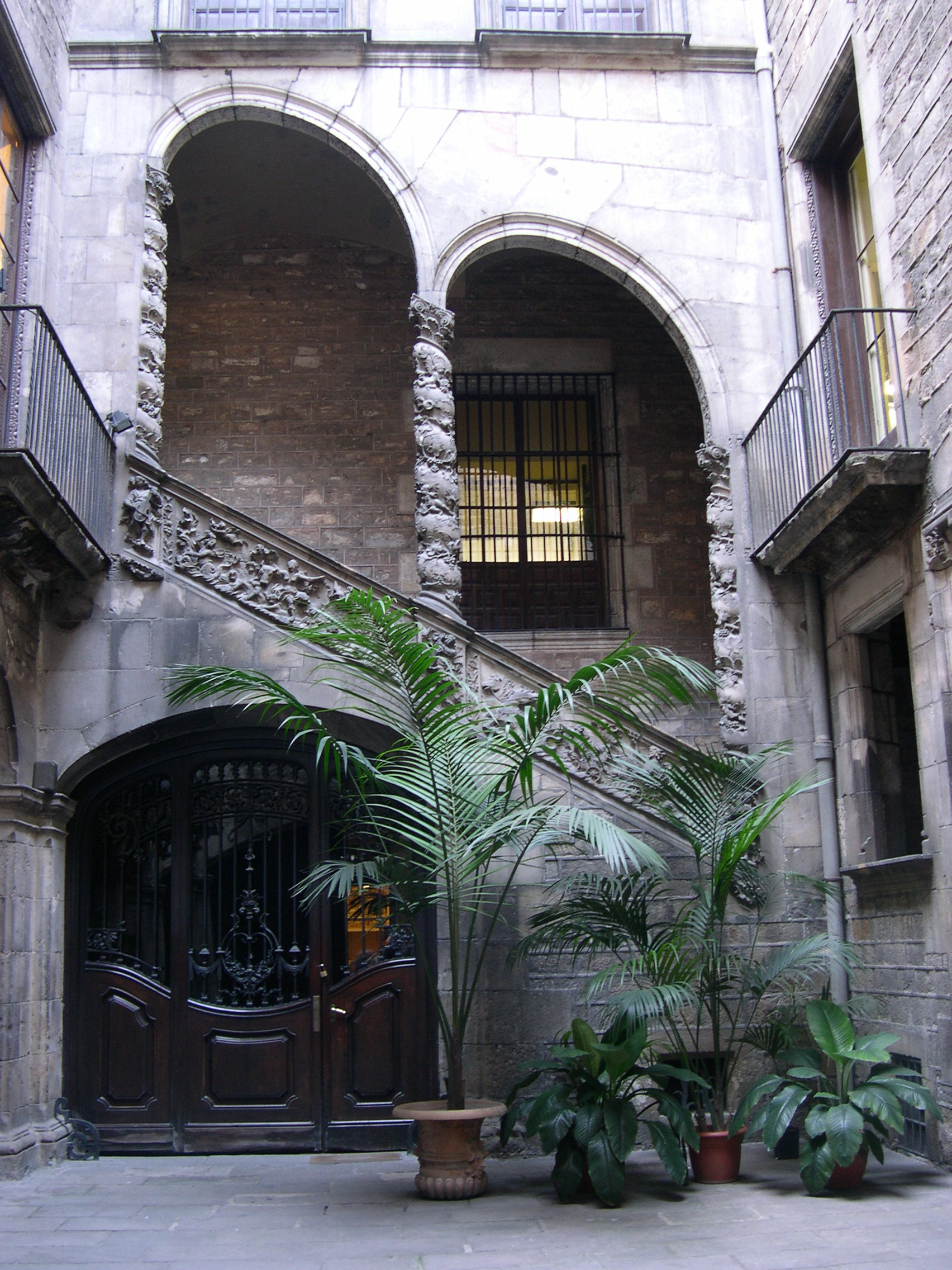 Pati del palau Dalmases, seu d'Òmnium Cultural, al carrer de Montcada de Barcelona.